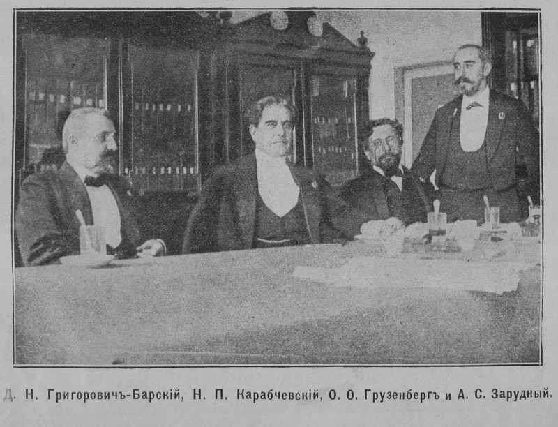 Адвокаты Бейлиса